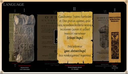 Euskara idatzia.